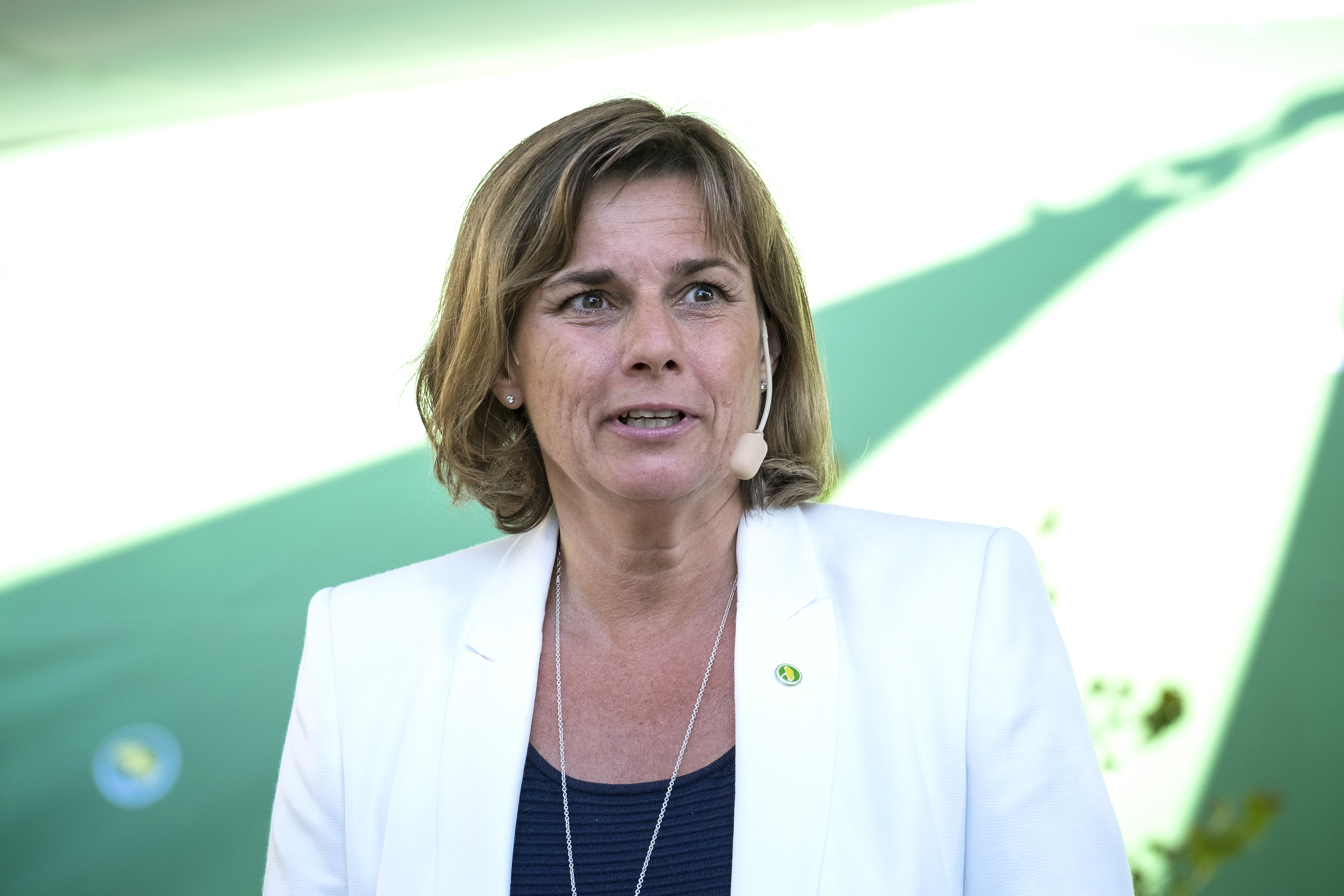 Miljöpartiets språkrör Isabella Lövin talar i Almedalen under Almedalsveckan i Visby, Gotland..Photo: News Øresund - Johan Wessman..© News Øresund - Johan Wessman (CC BY 3.0).. .Detta verk av News Øresund är licensierat under en Creative Commons Erkännande 3.0 Unported-licens (CC BY 3.0). Bilden får fritt publiceras under förutsättning att källa anges. .The picture can be used freely under the prerequisite that the source is given. News Øresund, Malmö, Sweden.News Øresund är en oberoende regional nyhetsbyrå som är en del av det oberoende dansk-svenska kunskapscentrat Øresundsinstituttet...